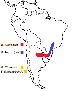 Distribución del Belocaulus